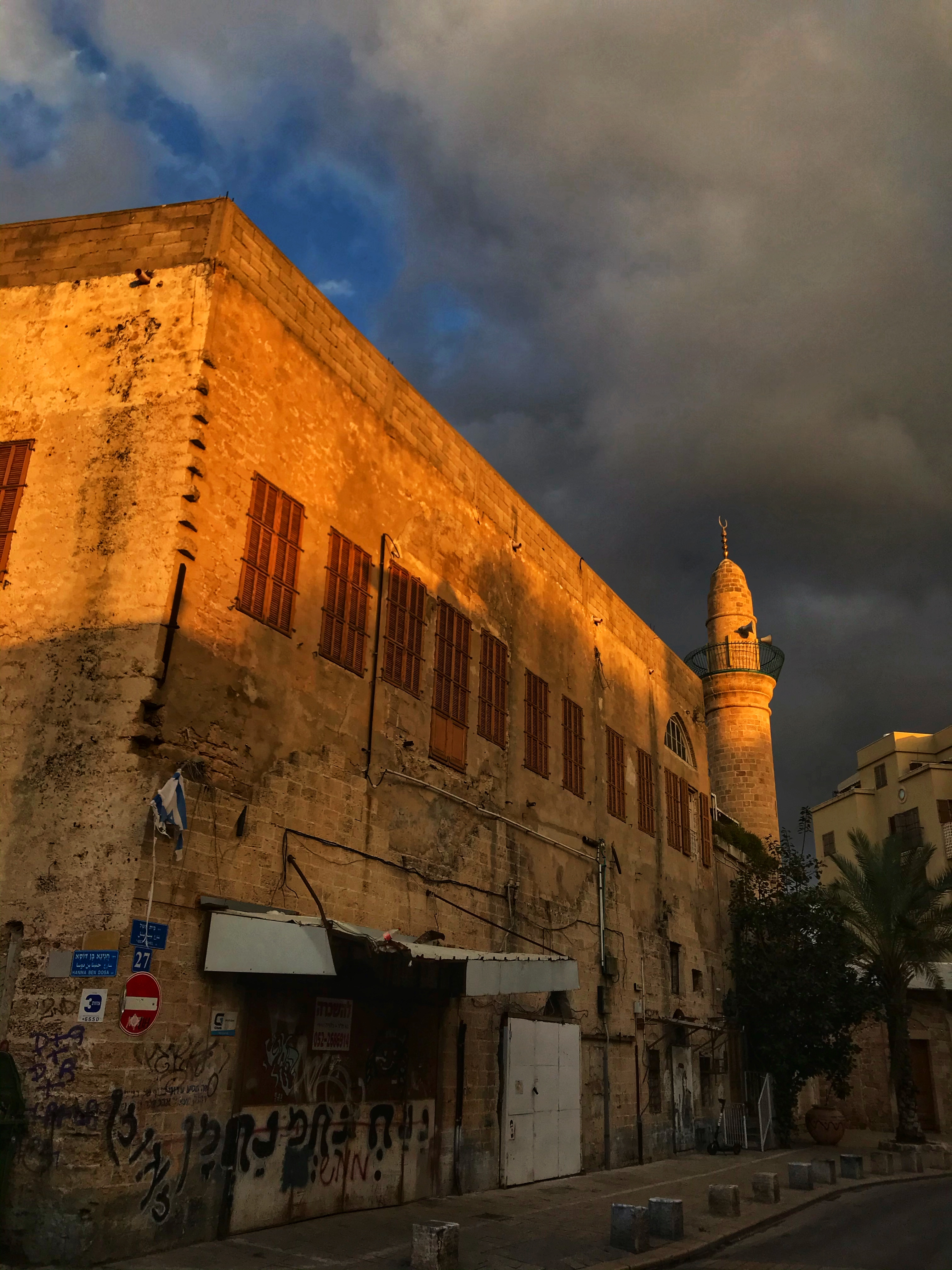 Siksik Mosque in Jaffa in 2020